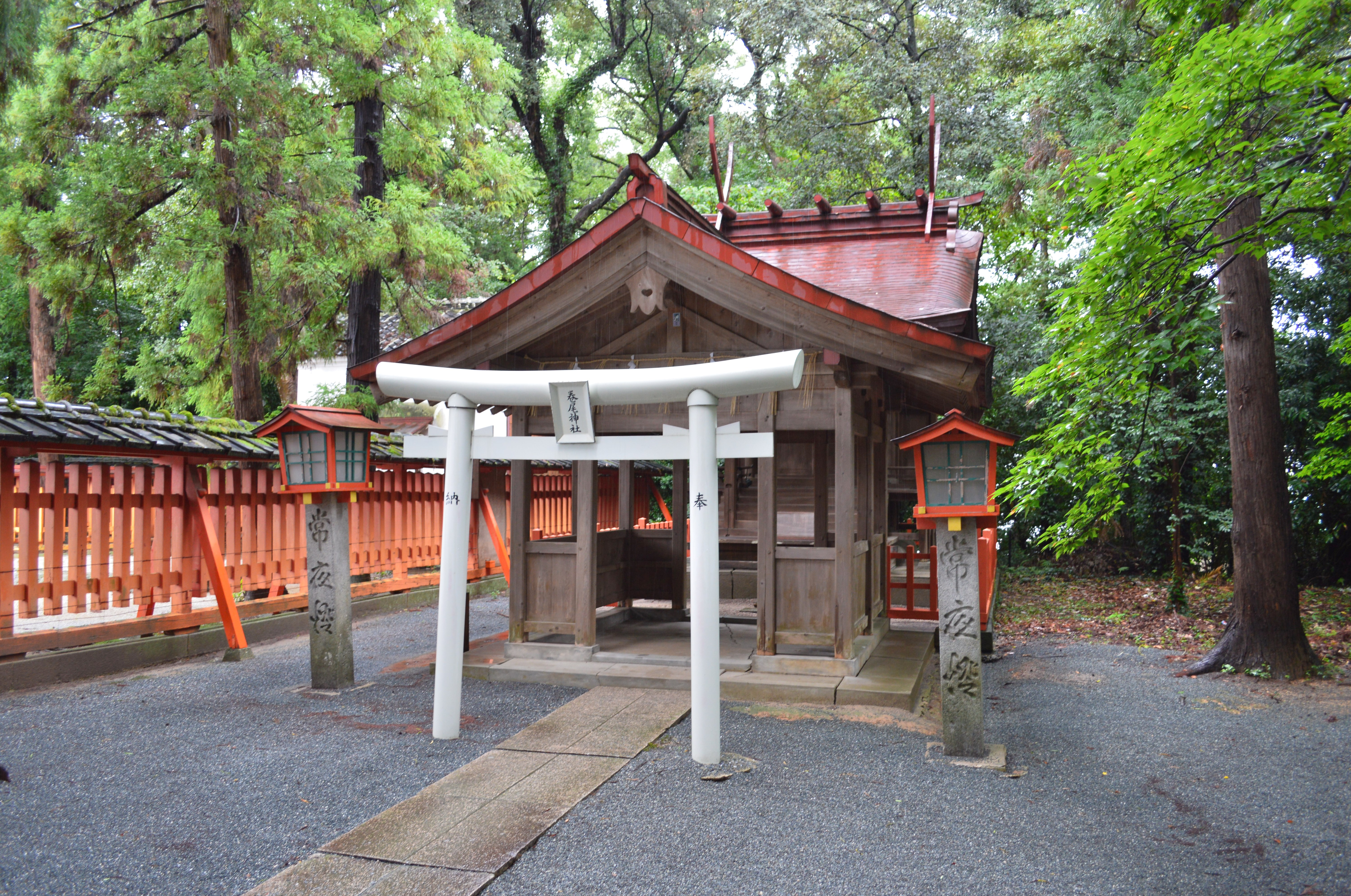 香椎宮 境内巻尾神社